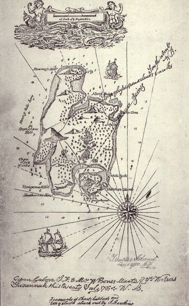 Il disegno ha oltre 100 anni ed e' quindi da considerarsi pubblico dominio. Tratto da EN.WIKI